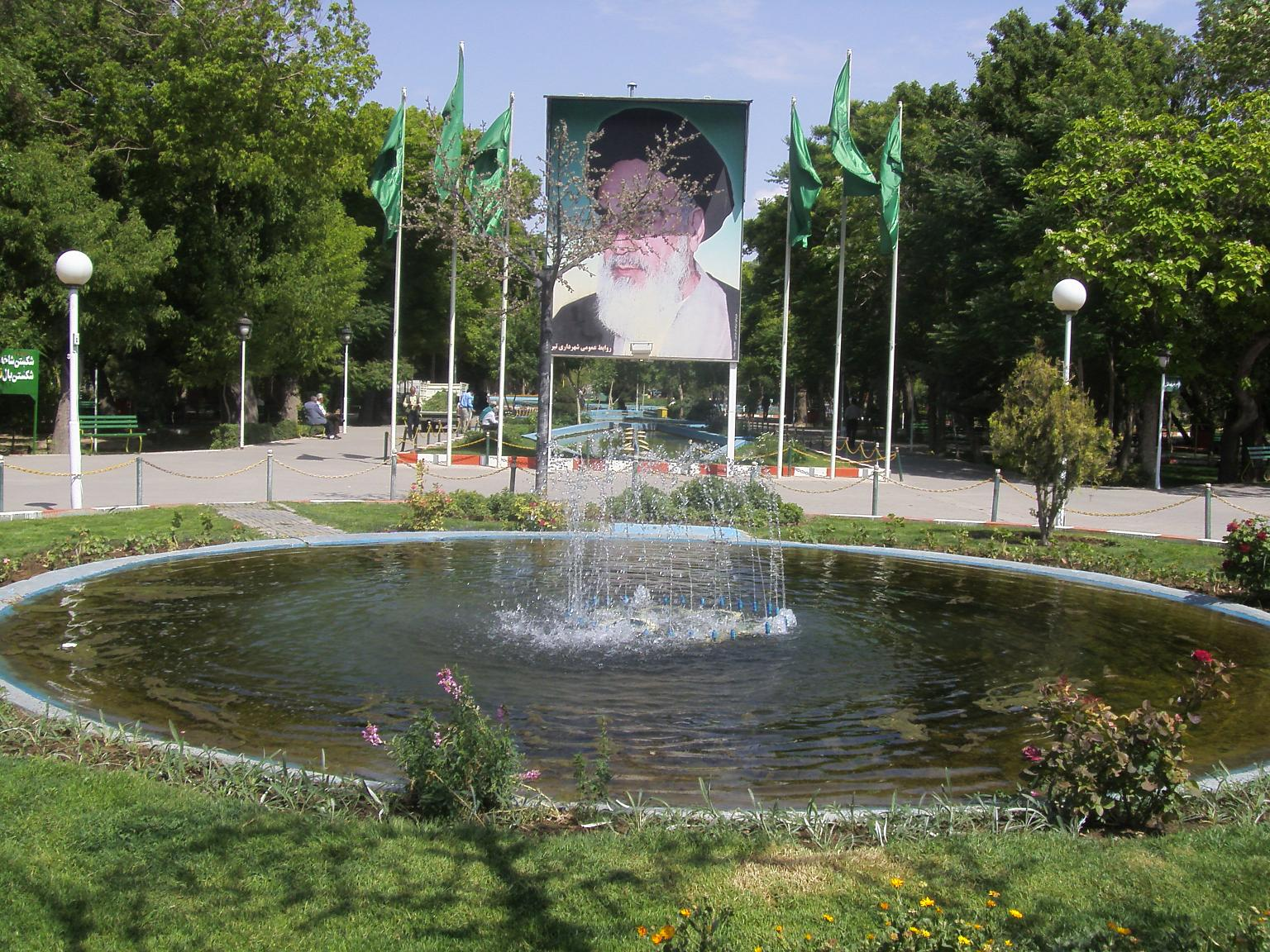 Golestan Park, Tabriz, Iran